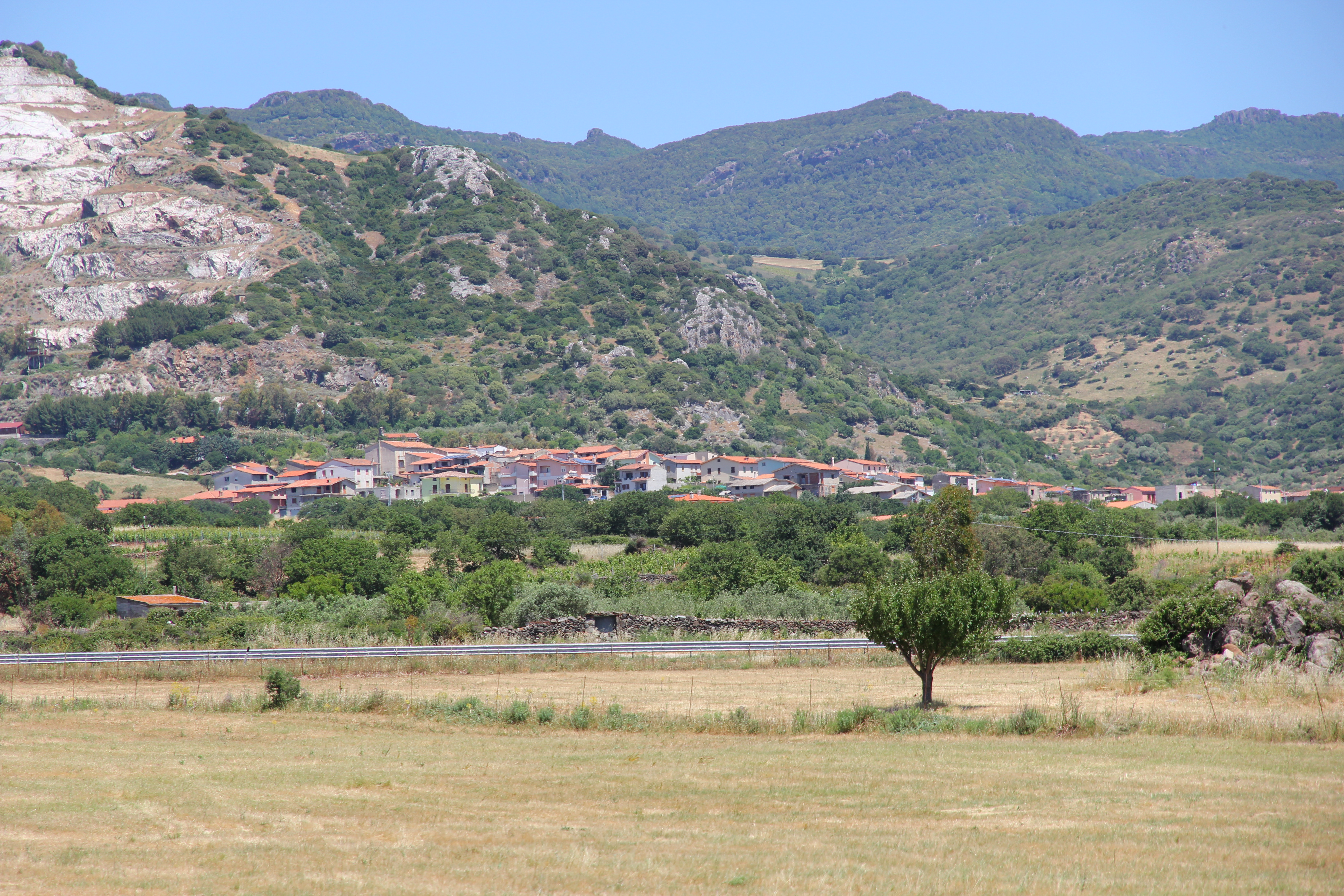 Silanus - Panorama